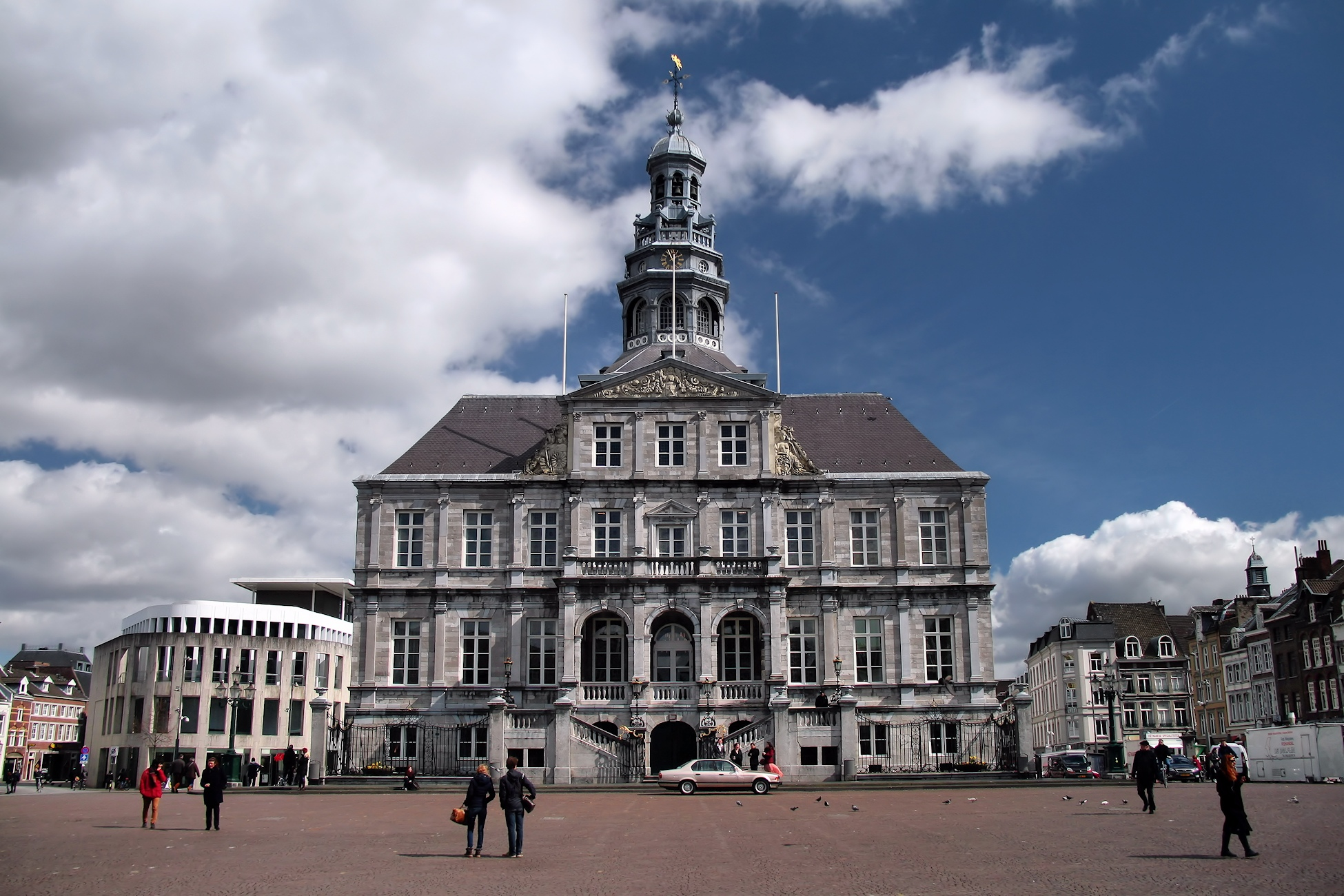 Stadhuis Maastricht